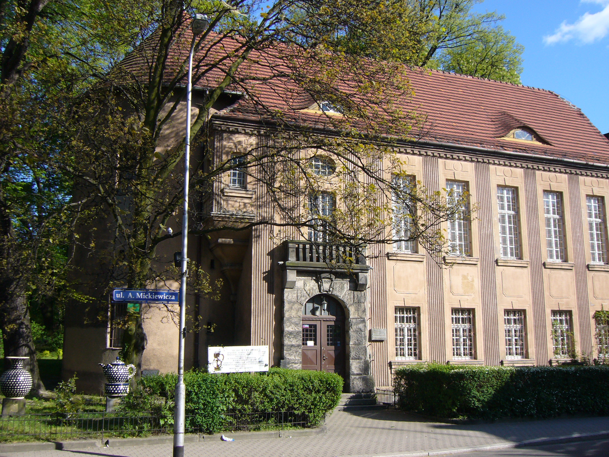 Muzeum Ceramiki przy ul. Mickiewicza, budynek przylega do murów miejskich